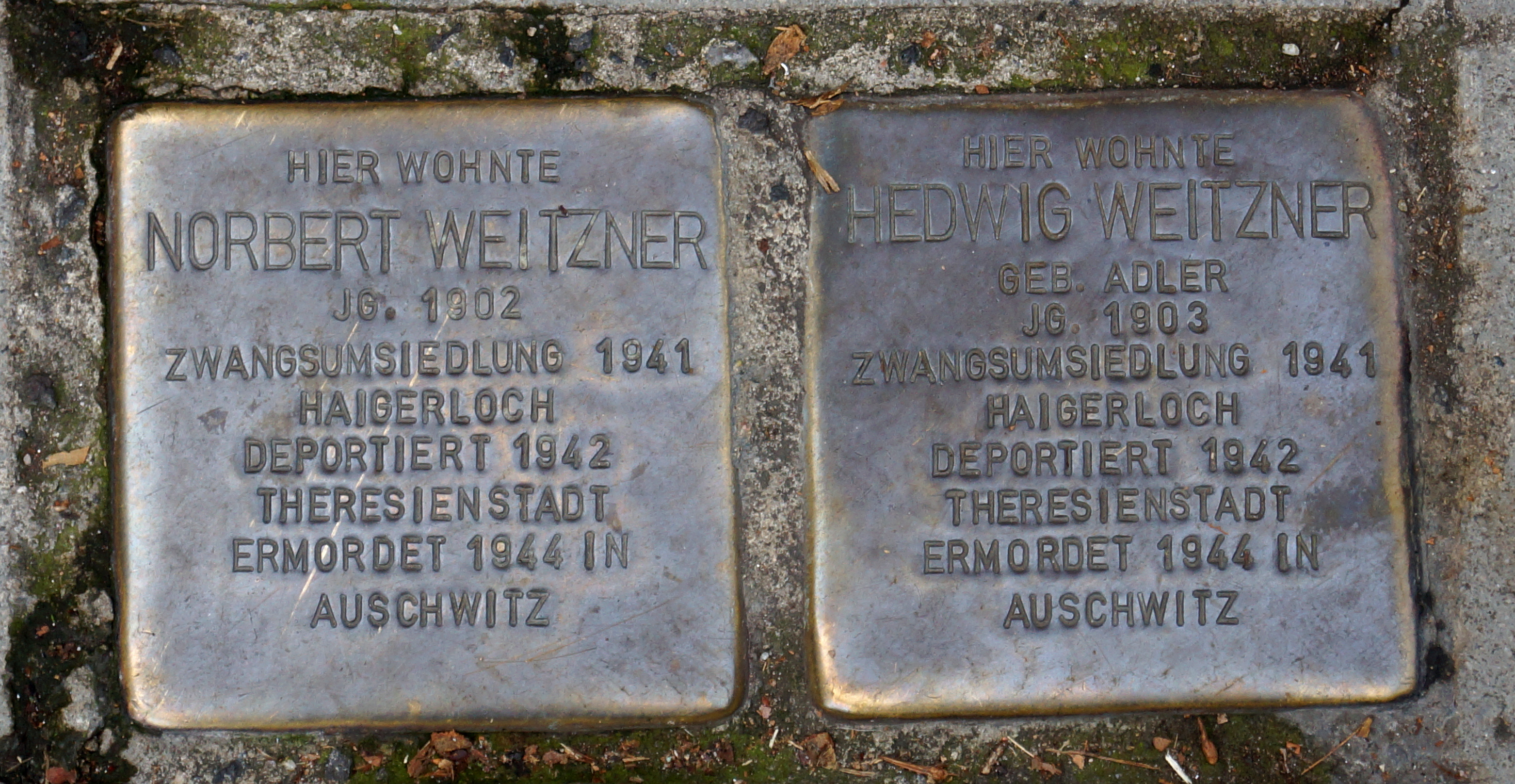 Stolpersteine für Hedwig, Norbert Weitzner. "Hier wohnte / Norbert Weitzner / JG. 1902 / Zwangsumsiedlung 1941 / Haigerloch / Deportiert 1942 / Theresienstadt / Ermordet 1944 in / Auschwitz","Hier wohnte / Hedwig Weitzner / Geb. Adler / JG. 1903 / Zwangsumsiedlung 1941 / Haigerloch / Deportiert 1942 / Theresienstadt / Ermordet 1944 in / Auschwitz"